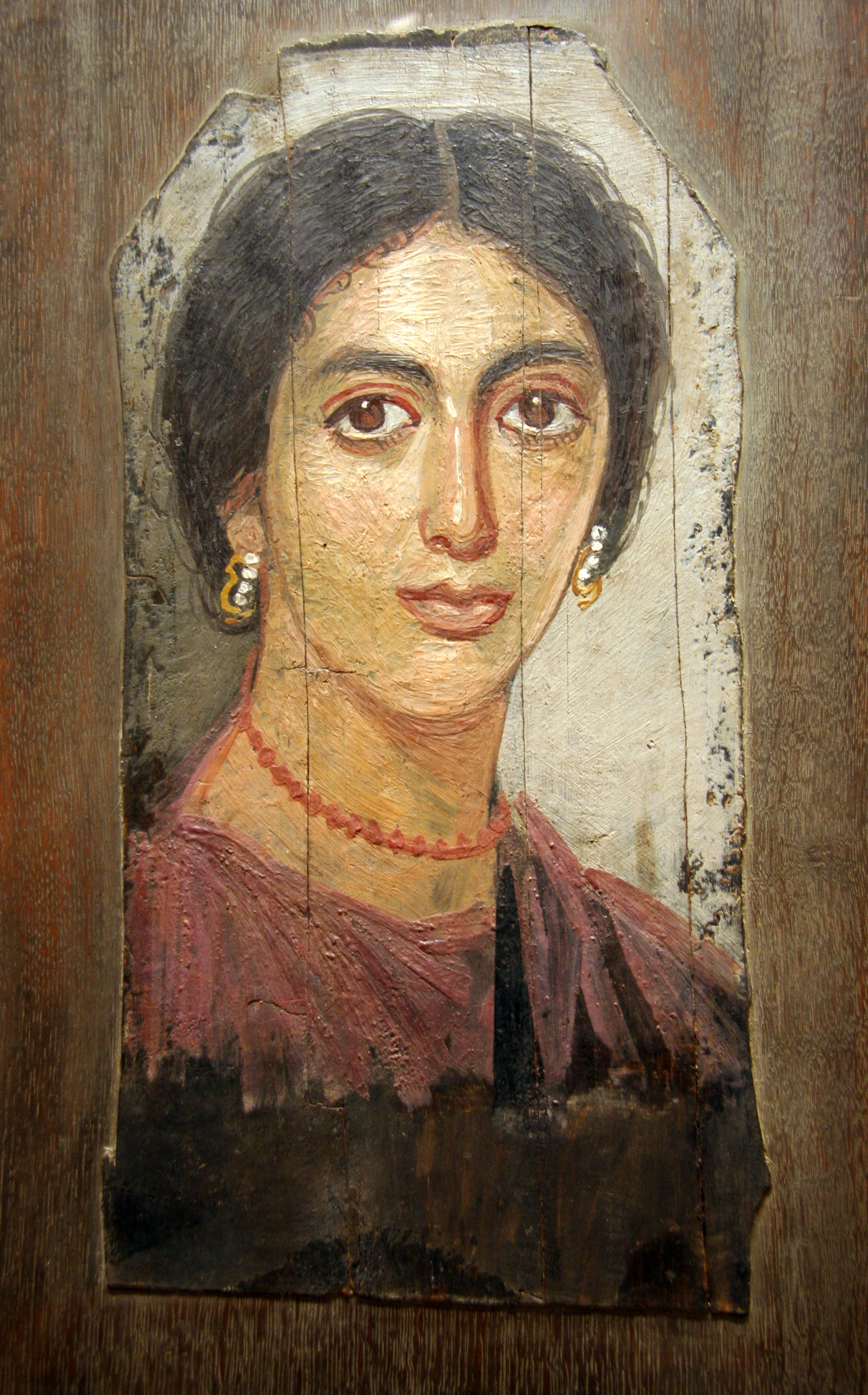 Faiyum mummy portrait